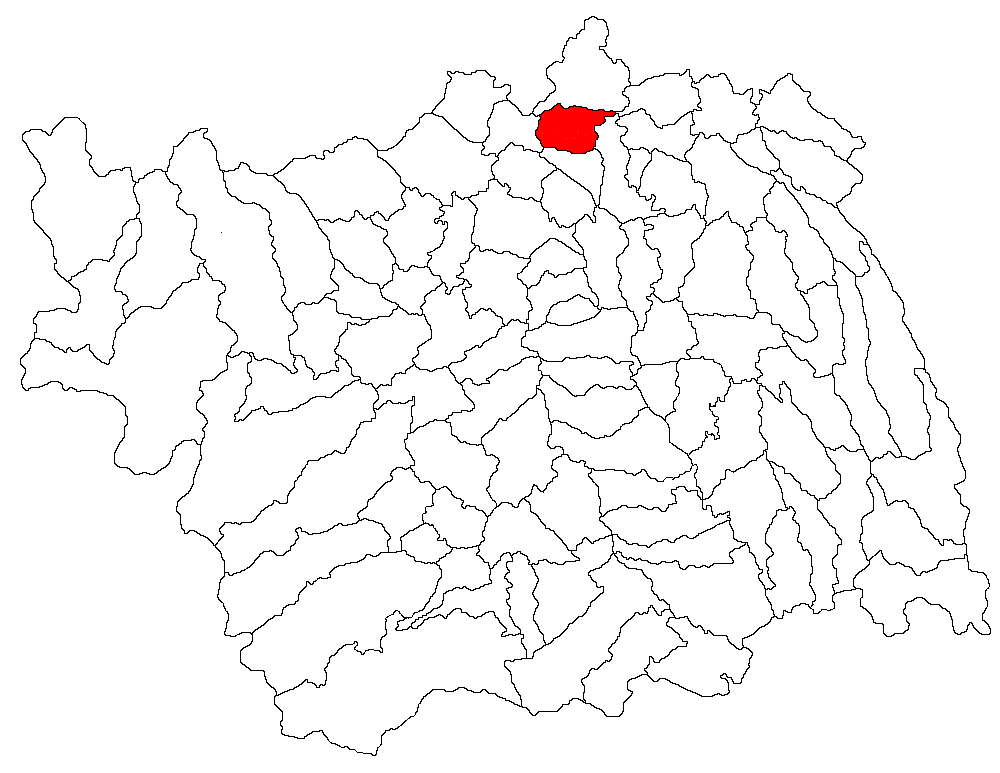 Categorie:Hărţi ale judeţului Bacău